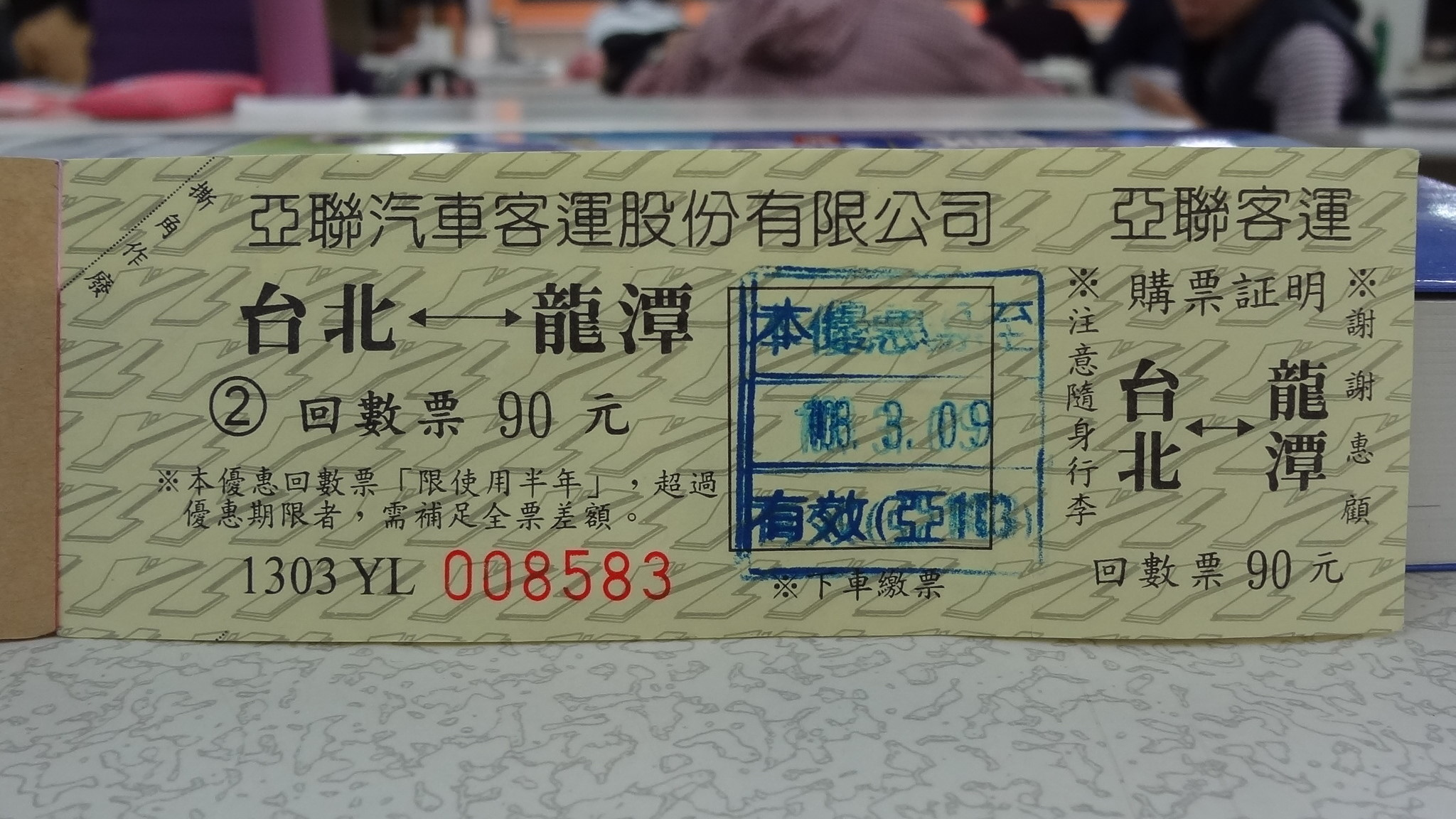 亞聯客運「台北－龍潭」回數票正面。